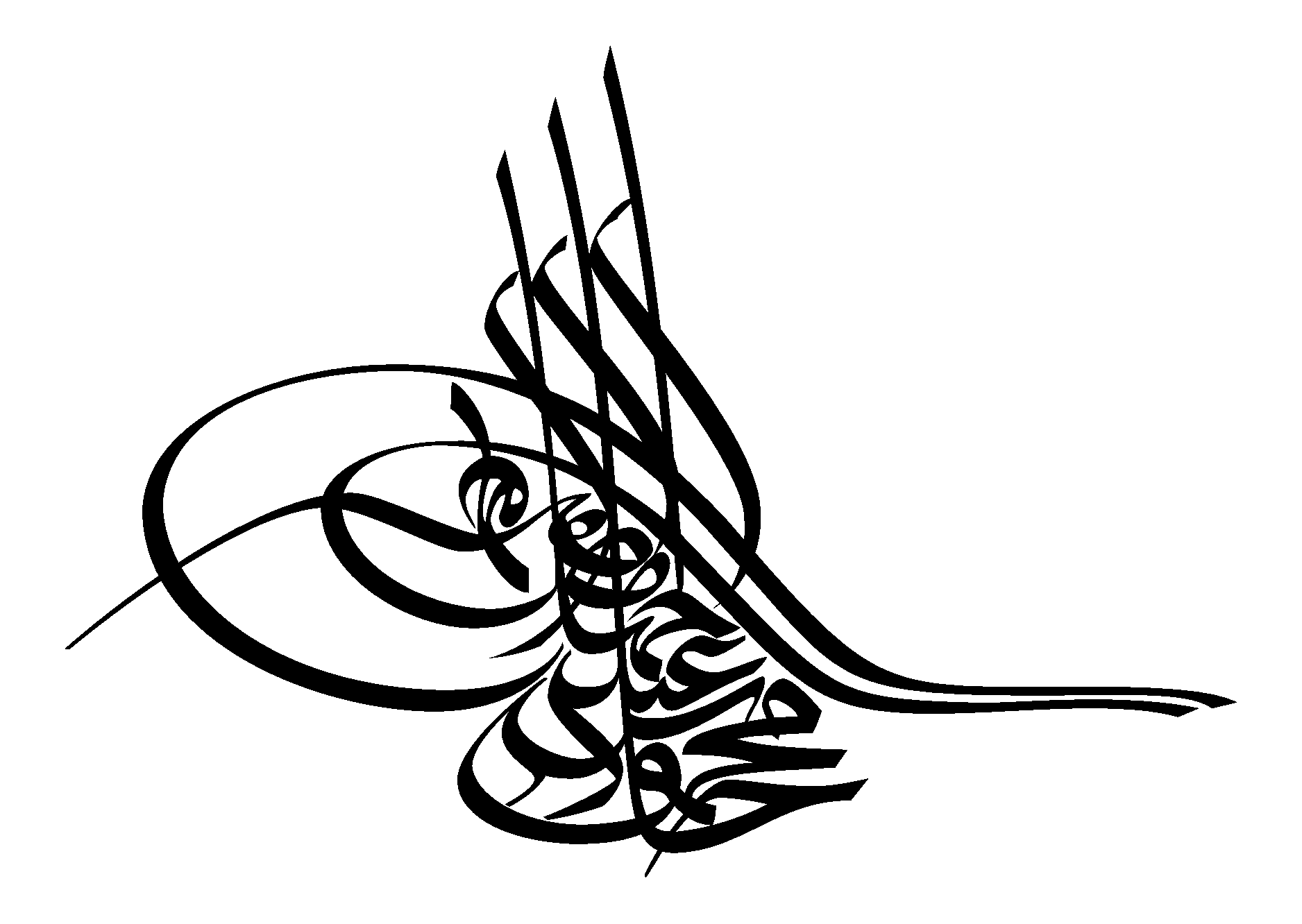 Sultan Mahmud II's tughra